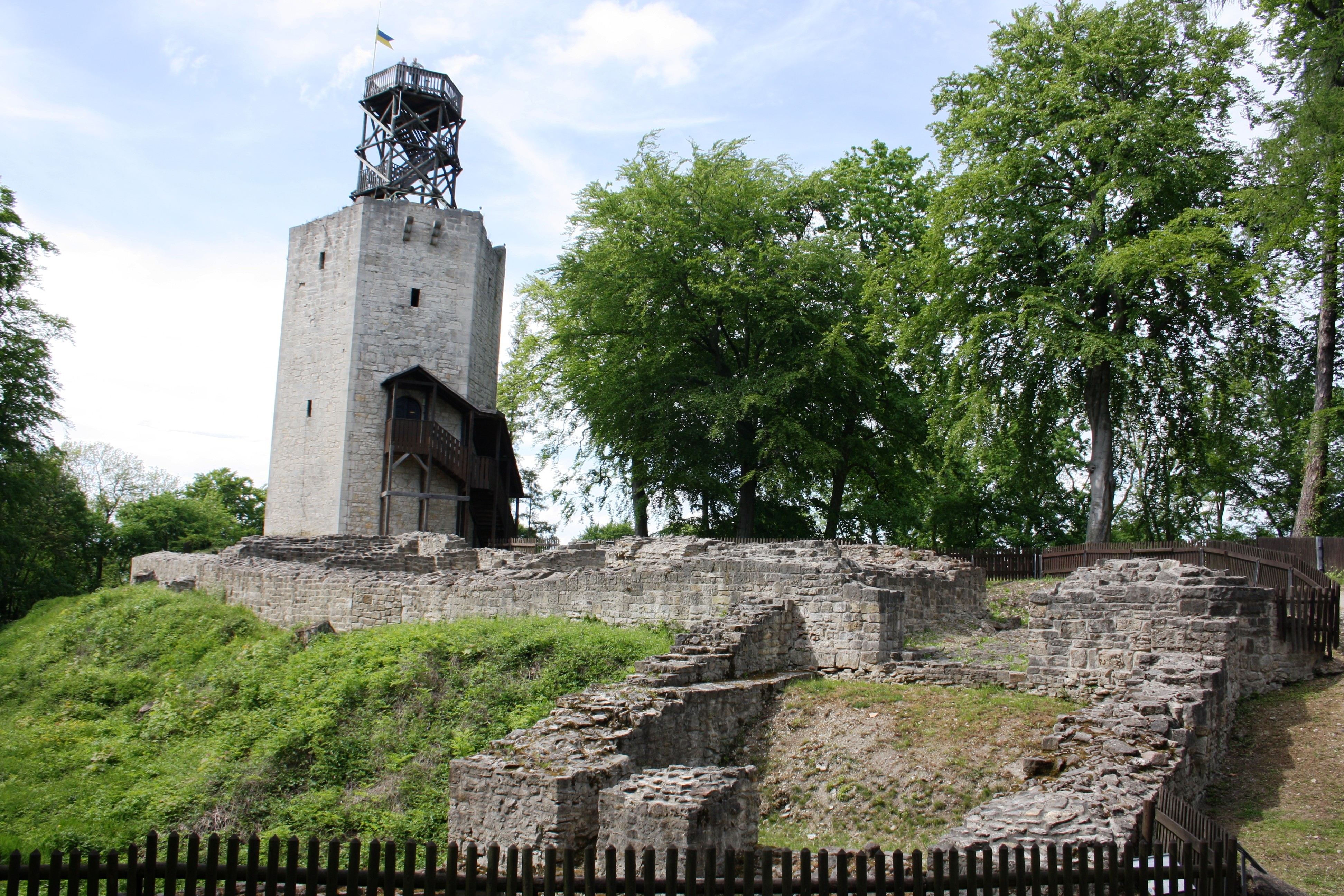 Die Burg Lichtenberg, auch als "Heinrichsburg" bezeichnet, ist eine Burgruine aus dem 12. Jahrhundert in den Lichtenbergen